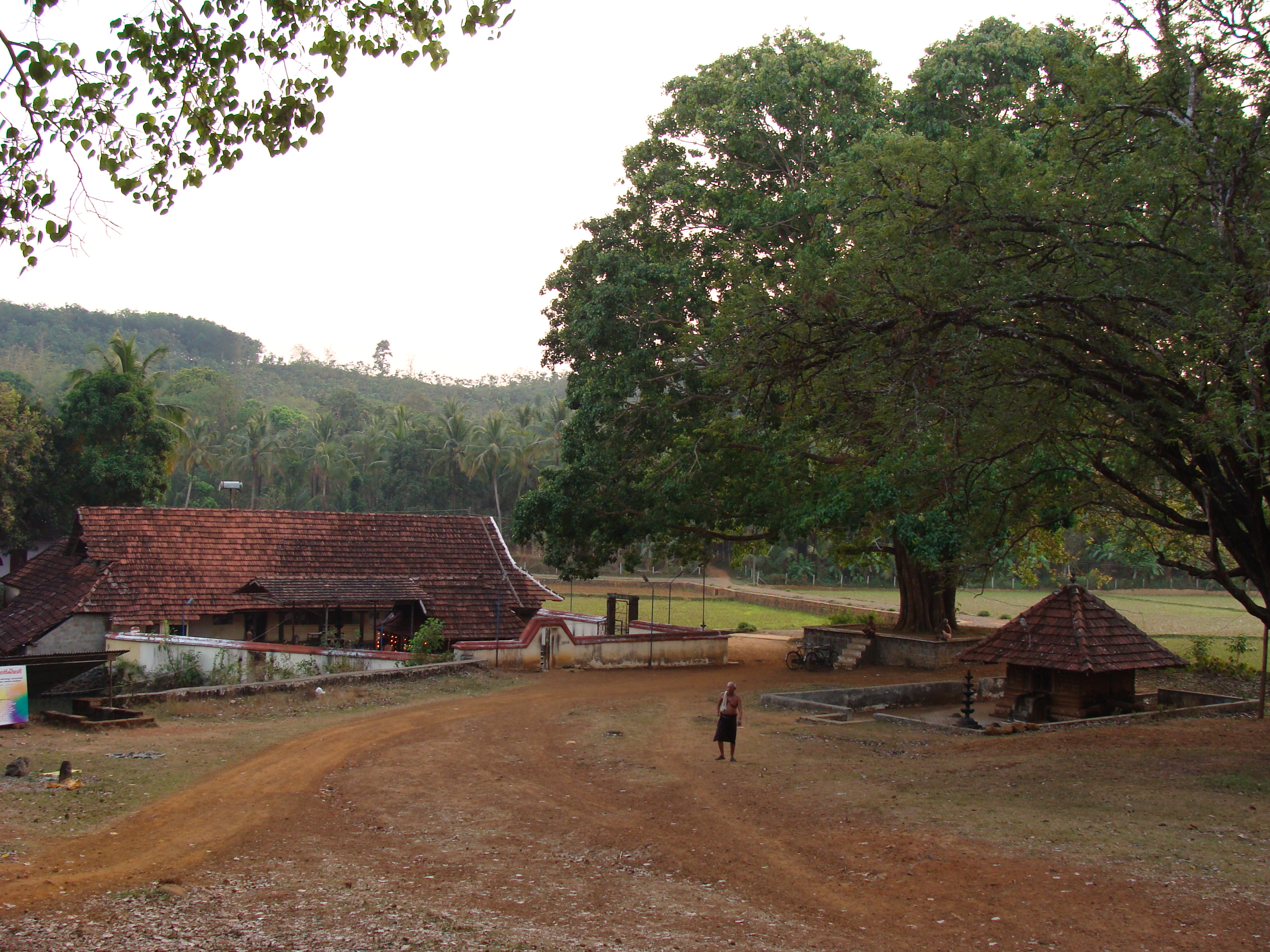 Scienic Panjal ayyappan Kavu Author Sreedharan Namboothiri Venue Panjal Ayyappan Kavu Date & Time 23/02/2008 6.080AM